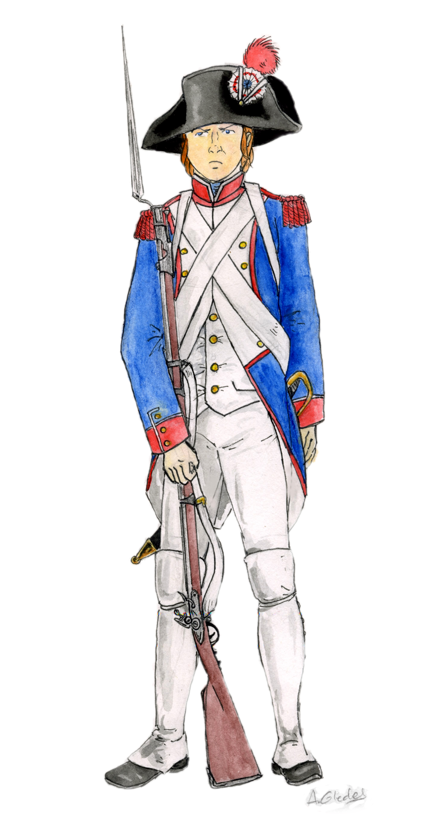 Fusilier de ligne français, Révolution française